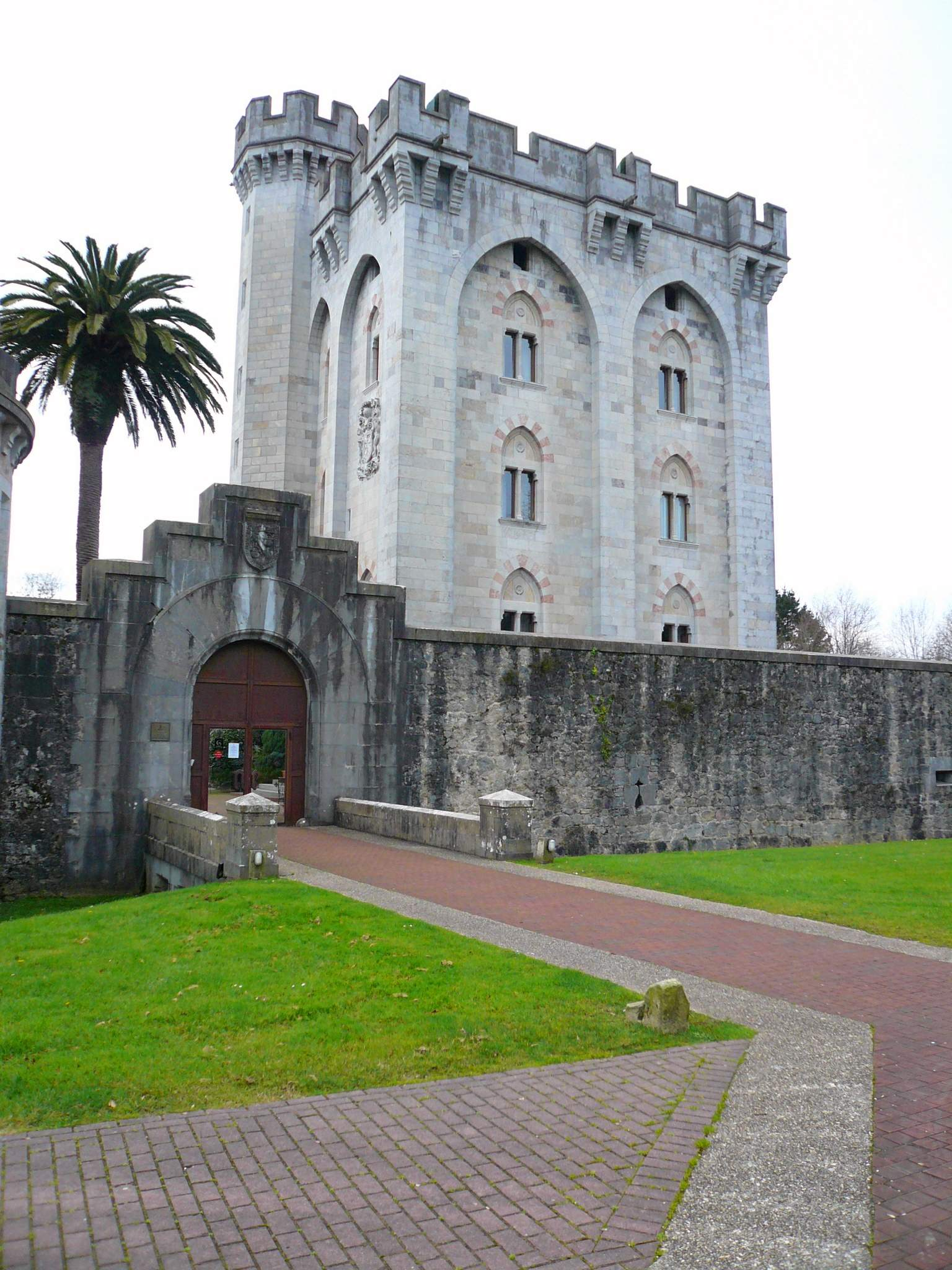 Gautegiz Arteaga (Vizcaya): Castillo de Arteaga y entorno